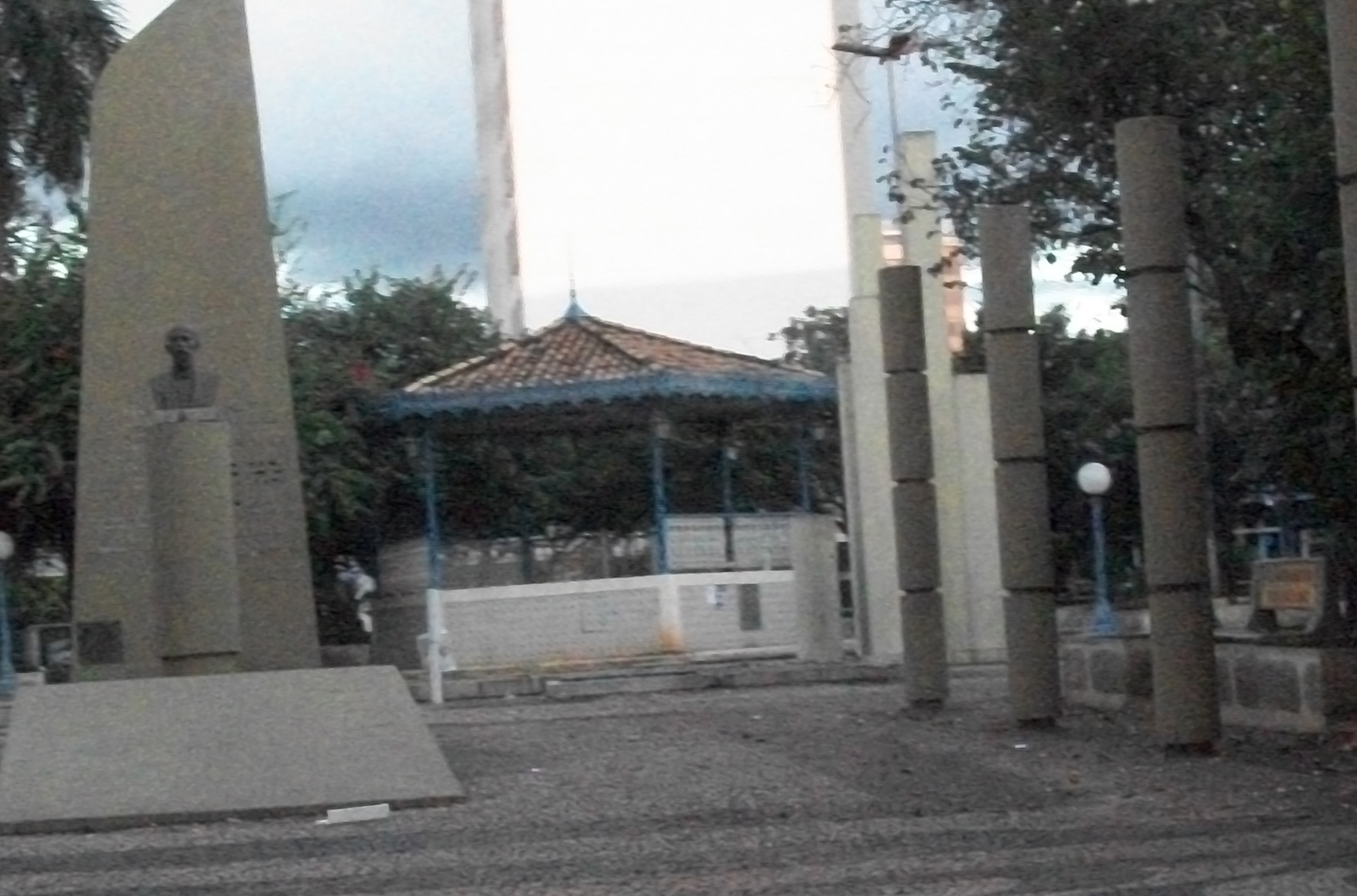 Praça Rui Barbosa em Araçatuba antes de ser reformada pela gestão Cido Sério. Atualmente a praça tem outra configuração arquitetônica, com remoção de seus elementos verticais, novo piso, reforma do coreto e reposicionamento de elementos.